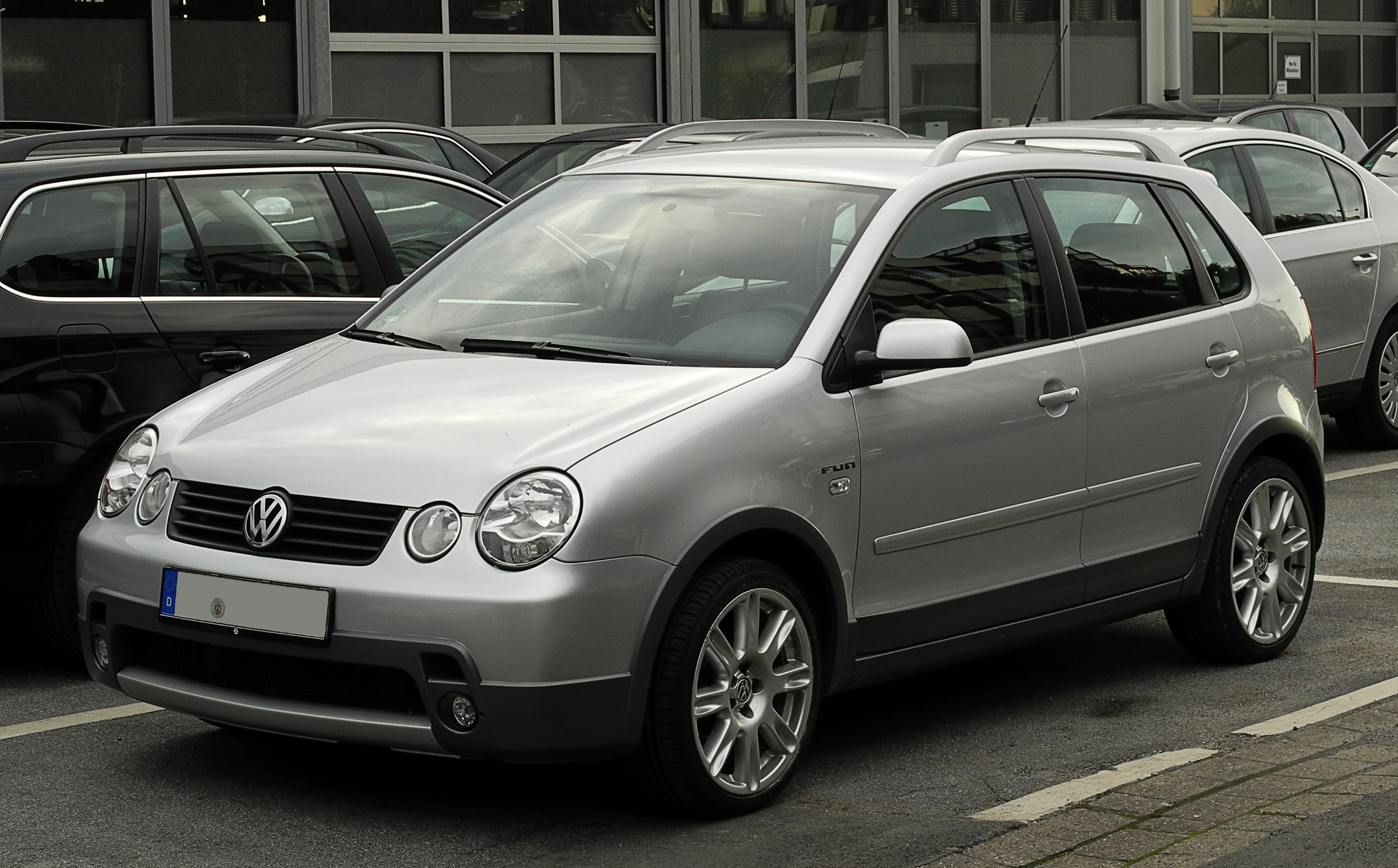 VW Polo Fun (IV)